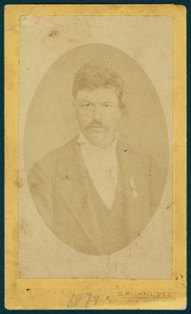 Портретна снимка на Тако Пеев.